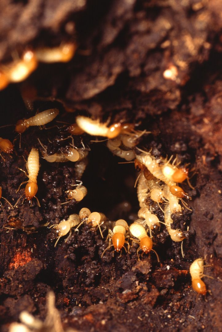 Termiten